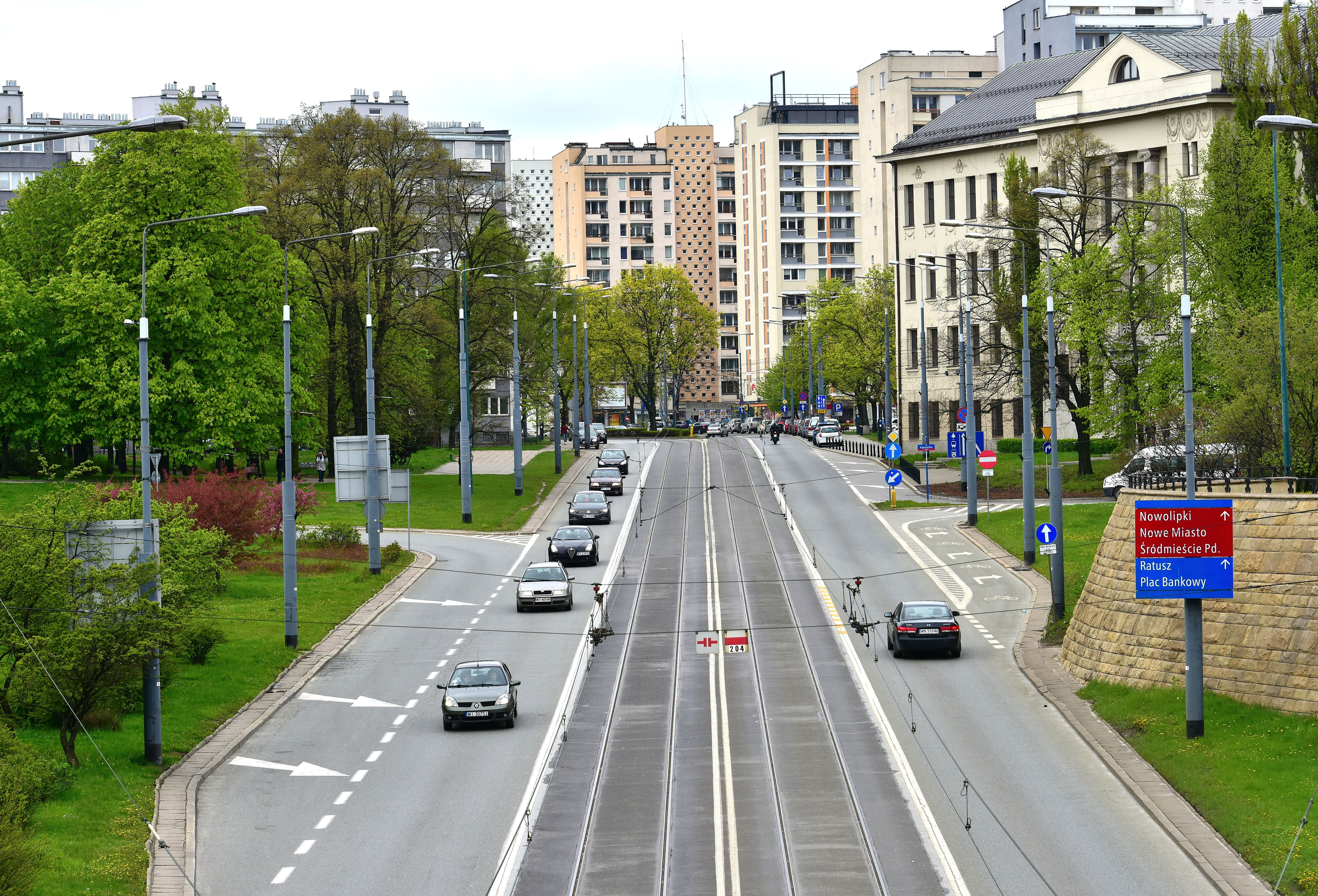 Aleja Solidarności w Warszawie przed tunelem Trasy W-Z